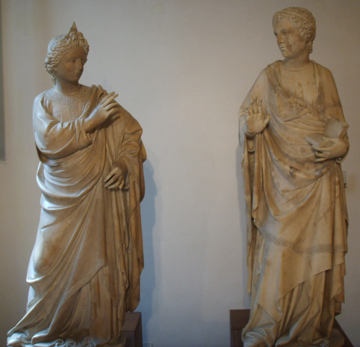 Opera del duomo (FI), giovanni d'ambrogio (attribuito), annunciazione, 1397 circa